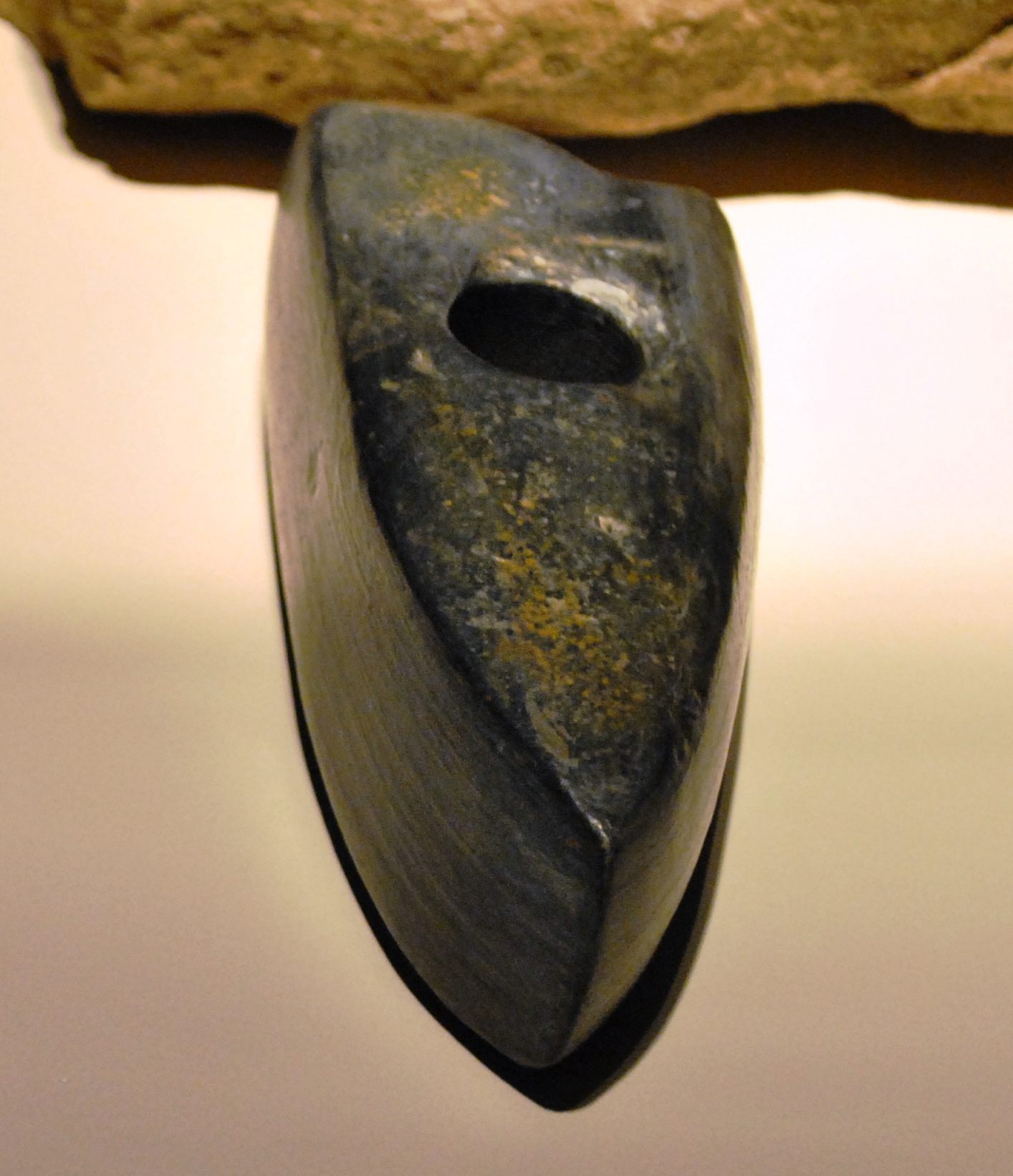 Steinkeil, Volkach-Fahr, 5000-4400 v. Chr., Amphibolit, 1970 beim Kiesabbau im Main gefunden